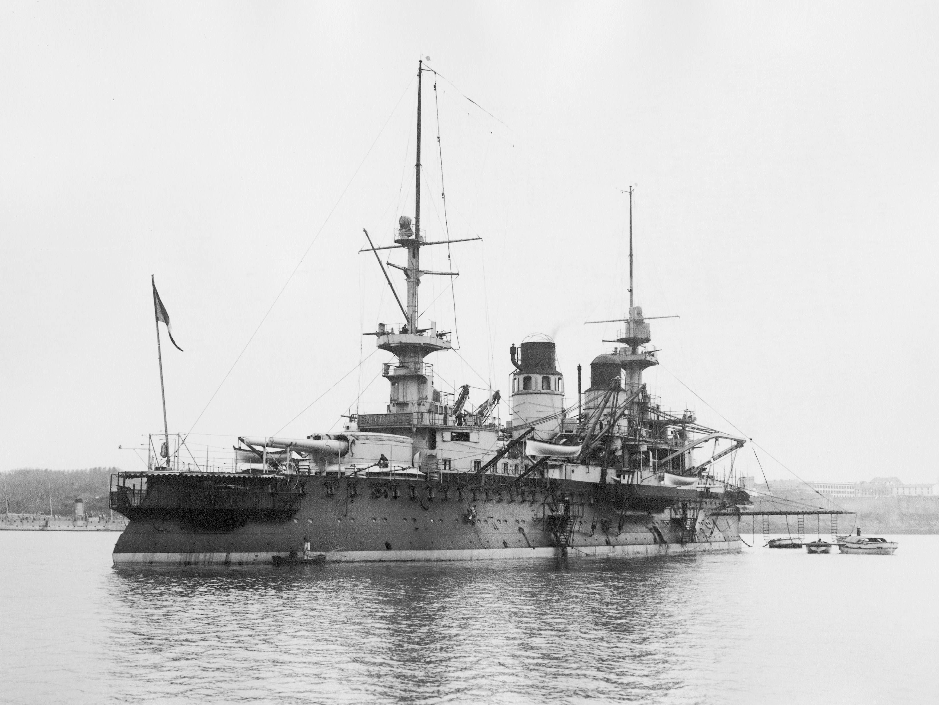 Le cuirassé Saint-Louis